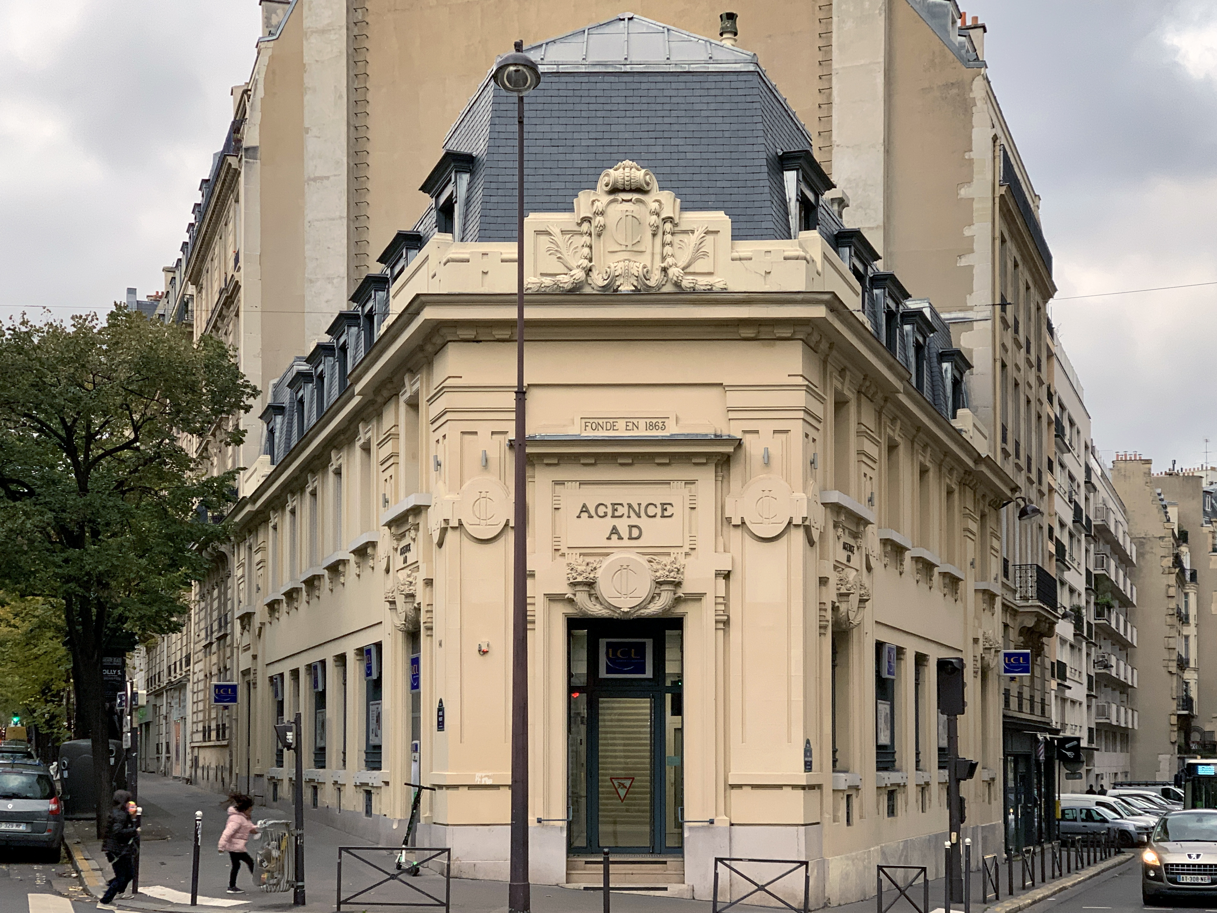 Bâtiment Agence AD, rue Jean de la Fontaine, Paris.